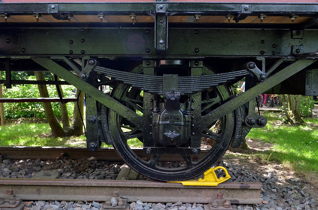 Hemmschuh an einem Waggon vor dem ehemaligen Bahnhof von Schapen, gegenüber von Schäfers Ruh’ in Braunschweig.